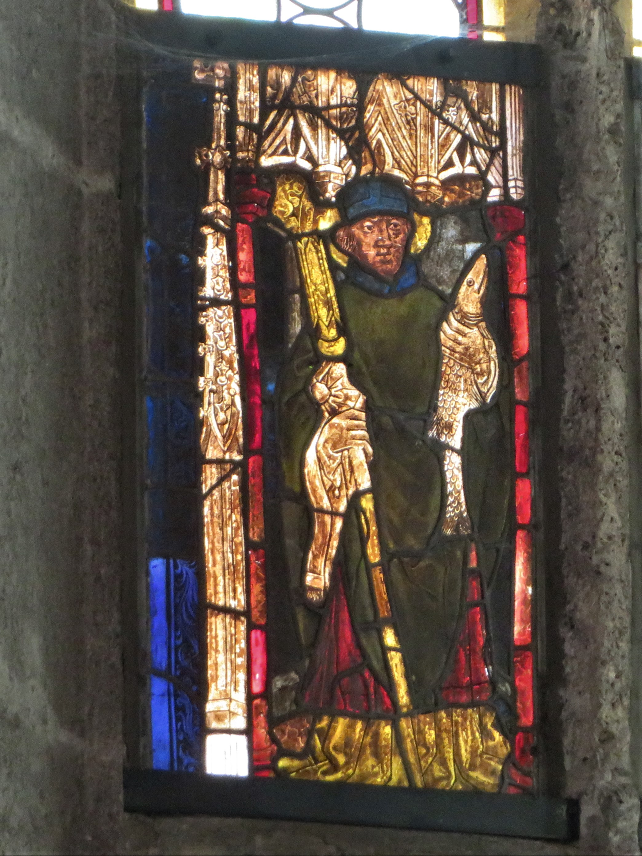 Pfarrkirche Ternberg, Glasmalerei, Abt Berthold von Garsten